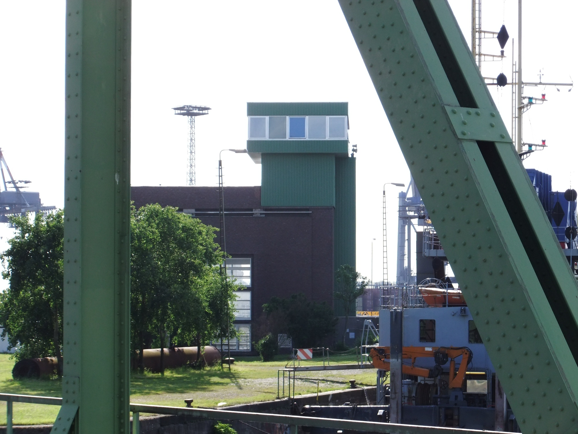 Nordschleuse, Maschinenhaus, in Bremerhaven, An der Nordschleuse 2. Die Denkmalgruppe ist ein geschütztes Kulturdenkmal in der Freien Hansestadt Bremen, mit der Nr. 1526 beim Landesamt für Denkmalpflege registriert.